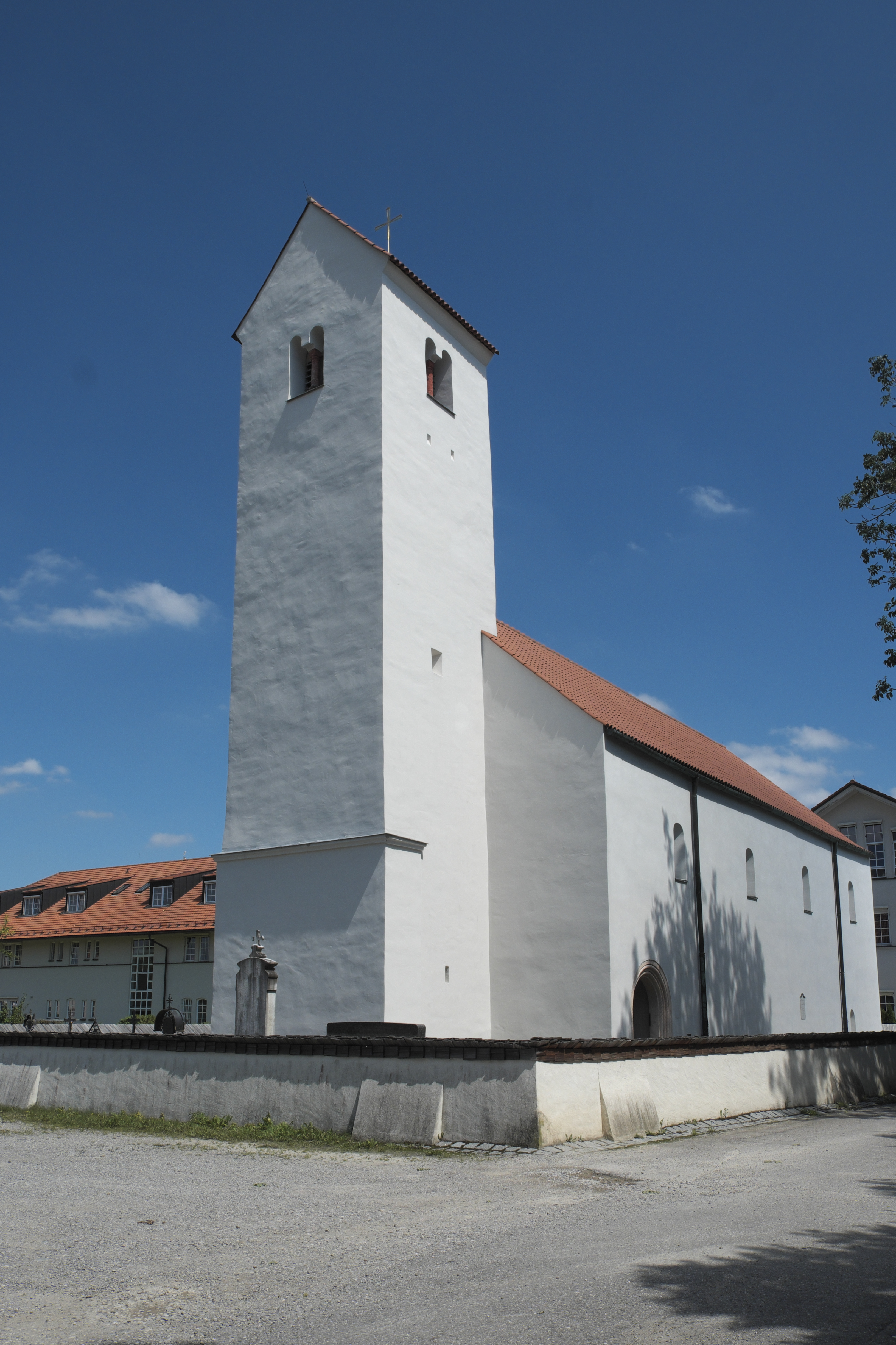 Katholische Filialkirche St. Aegidius in Keferloh (Grasbrunn) im Landkreis München (Bayern/Deutschland), Ansicht von Westen